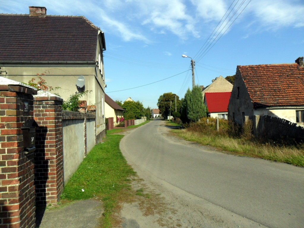 Gubinek woj. Lubuskie